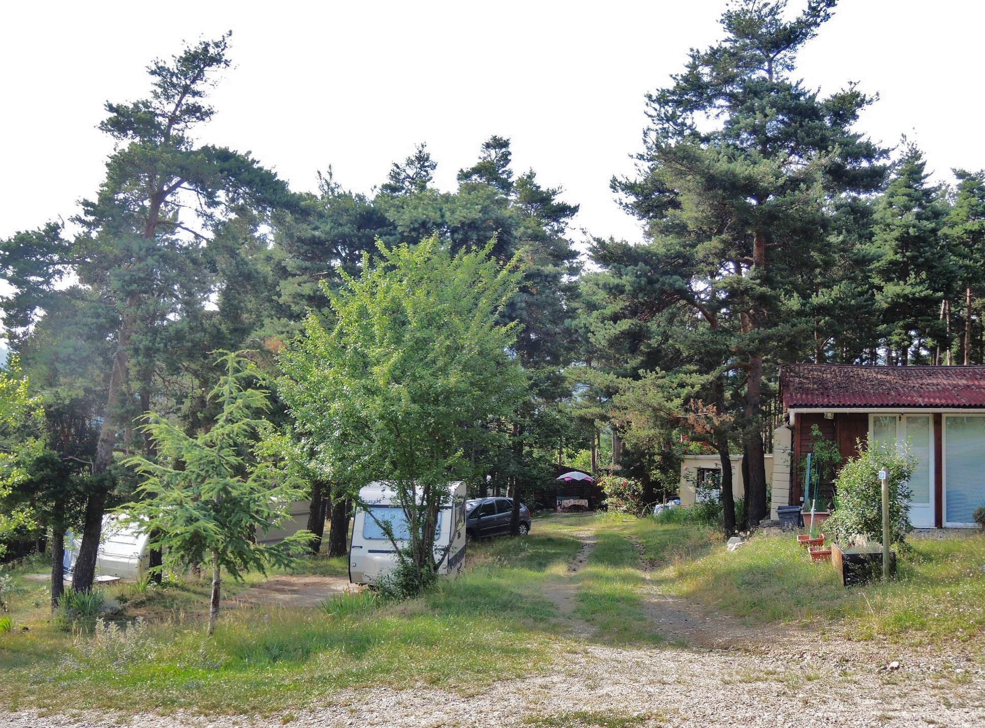 Saint-Jacques-d'Atticieux détail